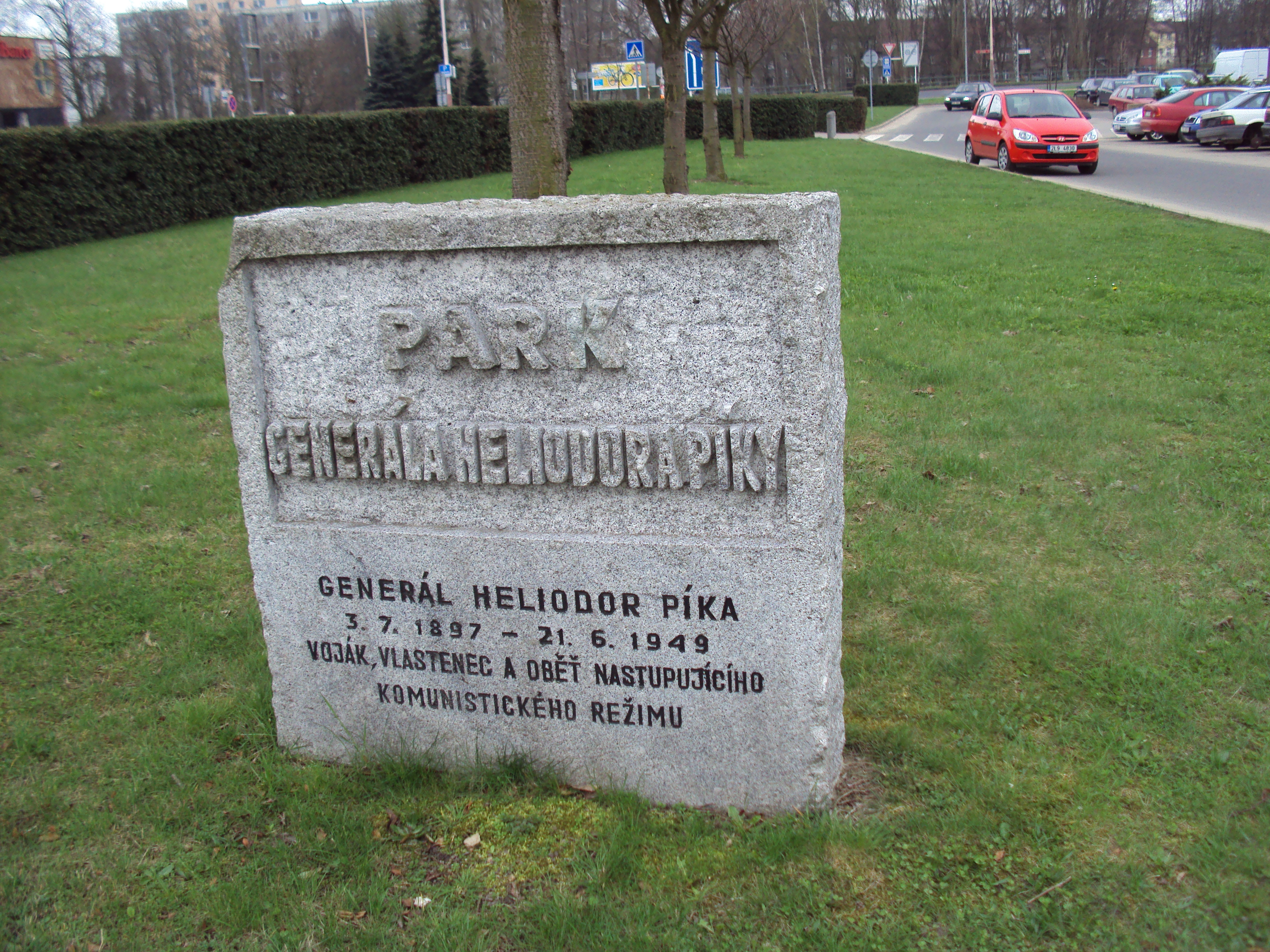 Česky: Pamětní deska označující park generála Heliodora Píky před kulturním domem Central v České Lípě